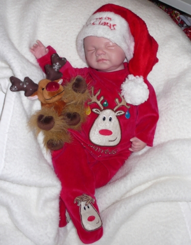 jessy2